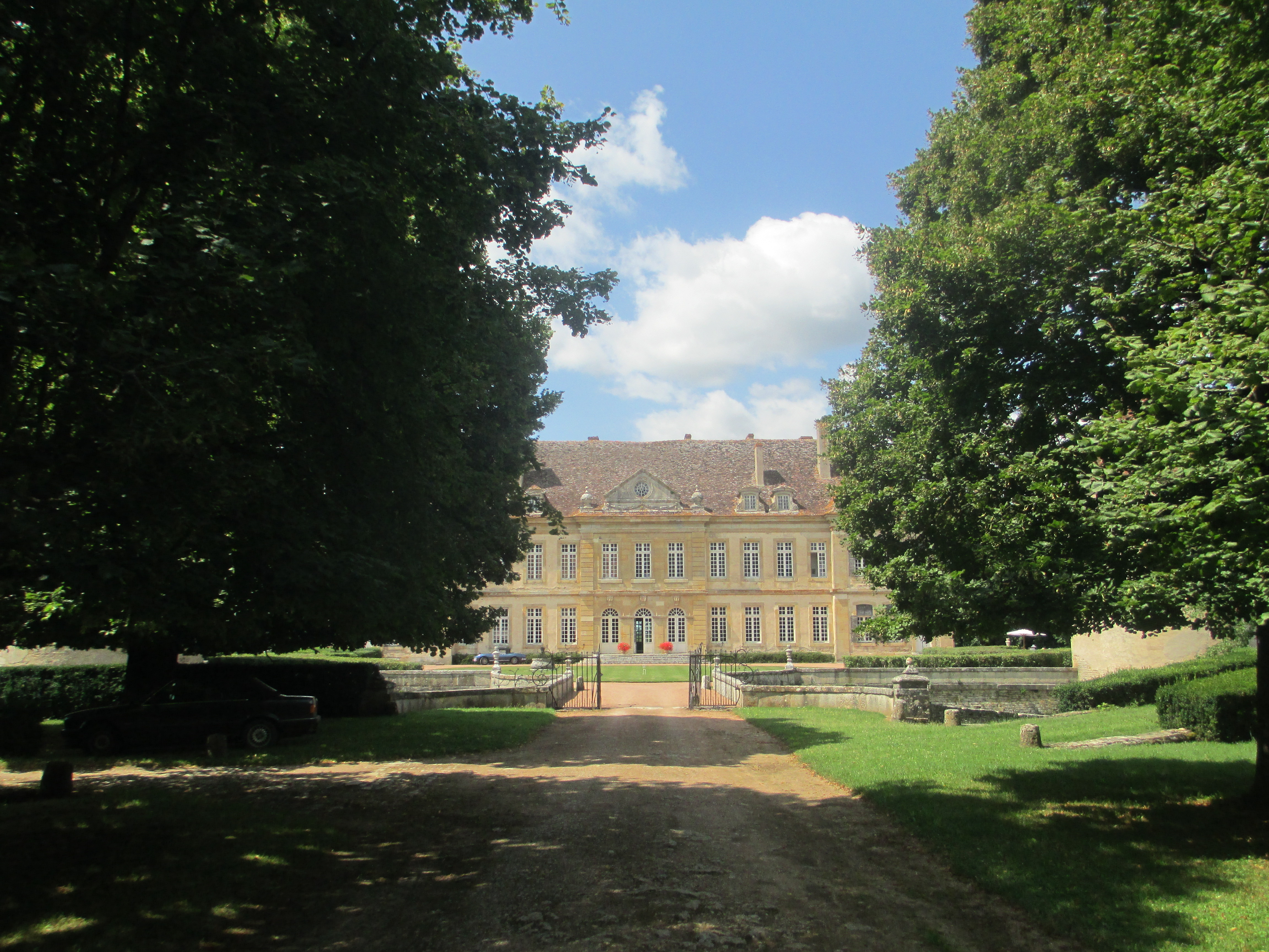 Château de Missery, dans le département de la Côte-d'Or, en France. .